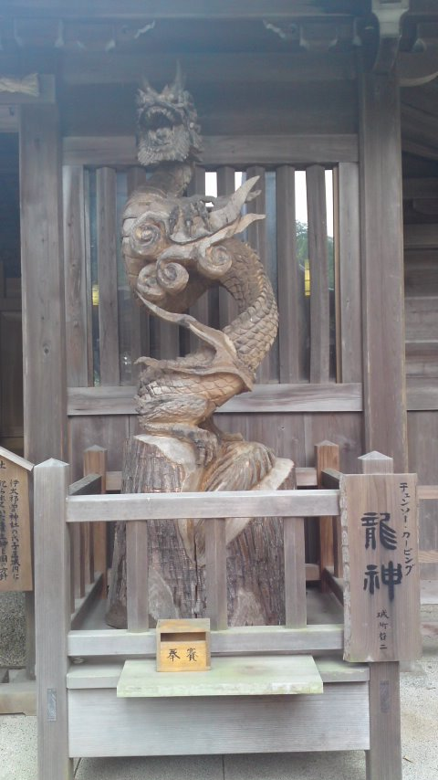 チェインソーで彫られた彫刻（チェインソーアート）。伊太祁曽神社に奉納された物。